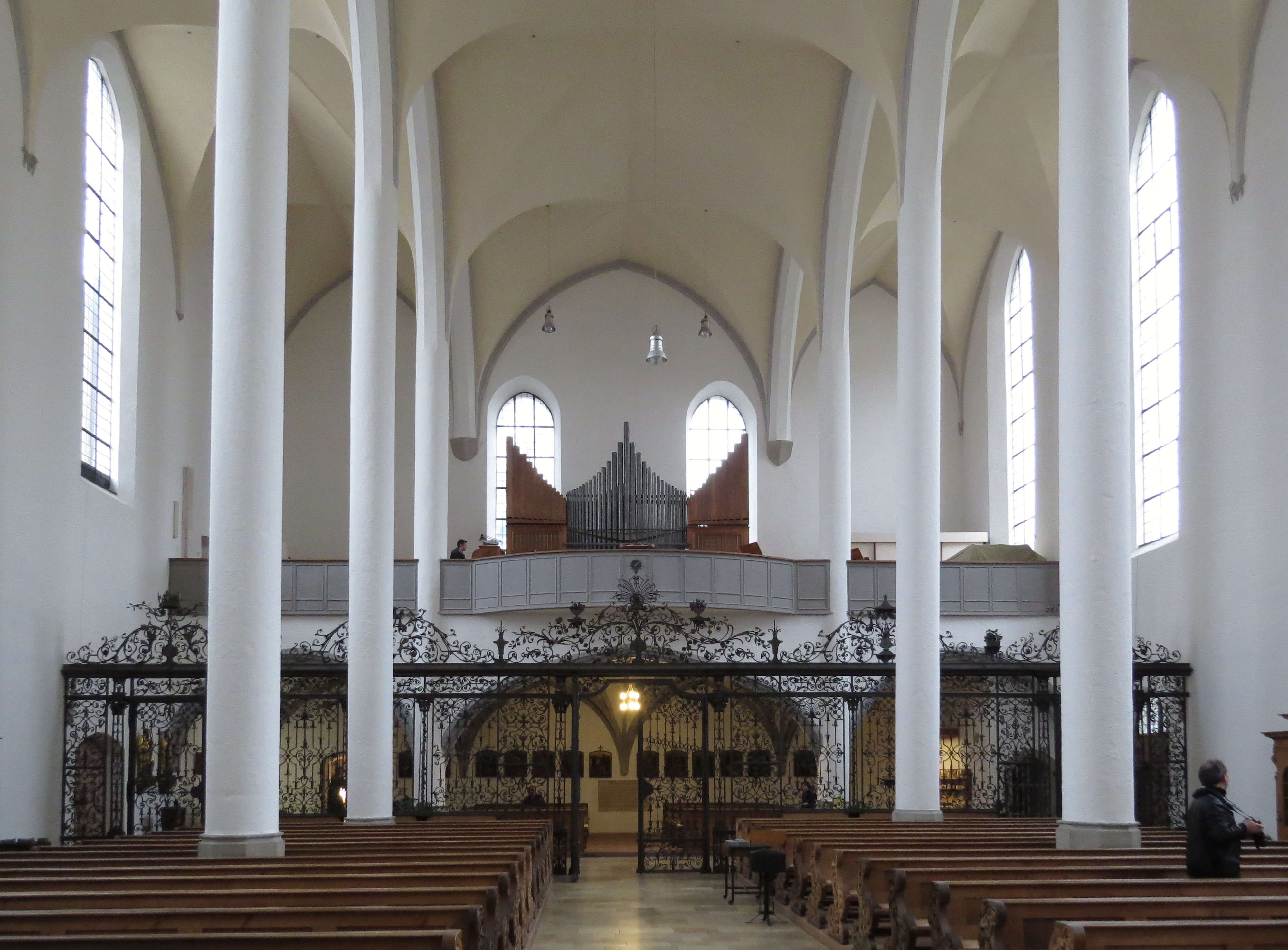 Blick nach hinten zur Empore in der Katholischen Heilig-Kreuz-Kirche Augsburg.